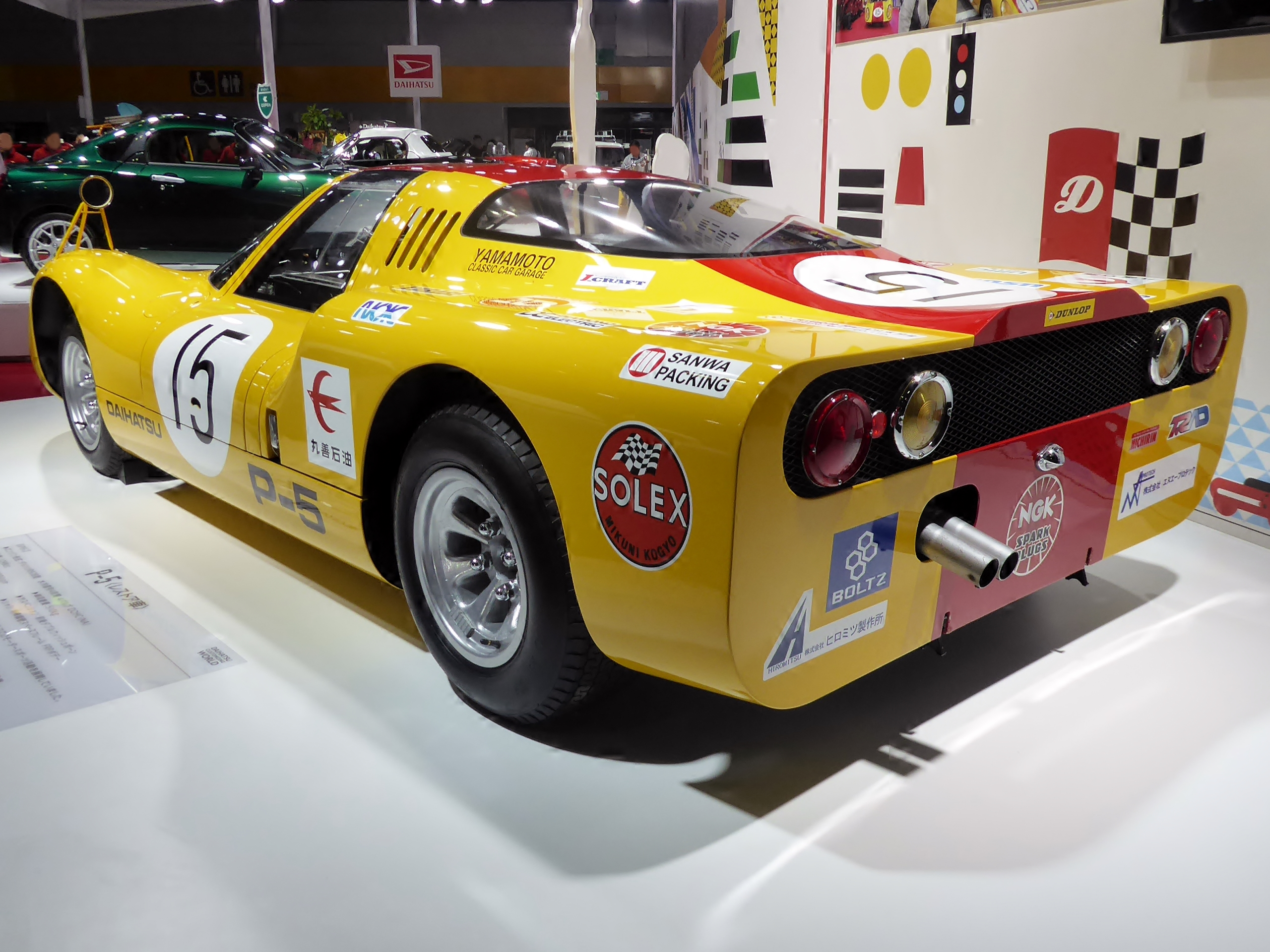 大阪オートメッセ2019においてダイハツ・P-5を撮影。